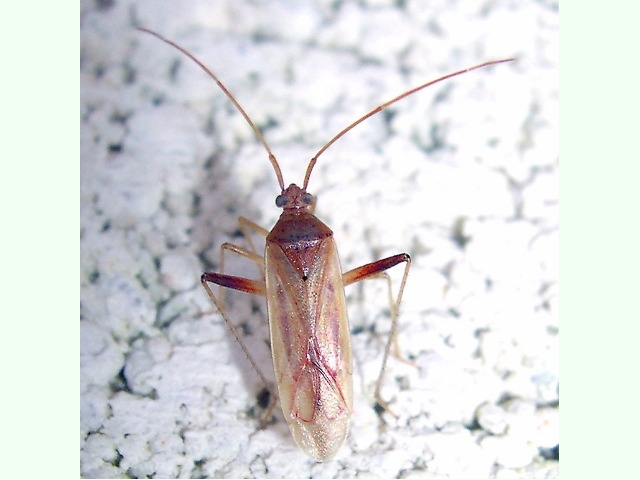 Amblytylus nasutus, Spain